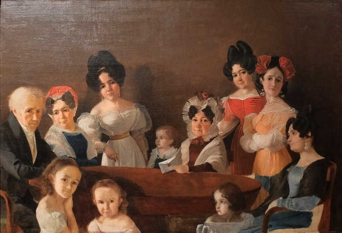 Портрет князей Шаховских-Голынских (происходит из имения Белая Колпь)